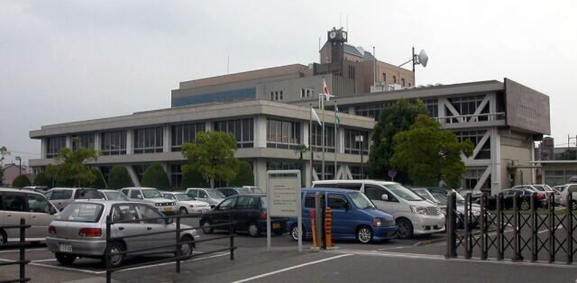 尾張旭市役所 2005年7月31日 投稿者撮影 Category:愛知県の官公庁画像 category:尾張旭市の画像